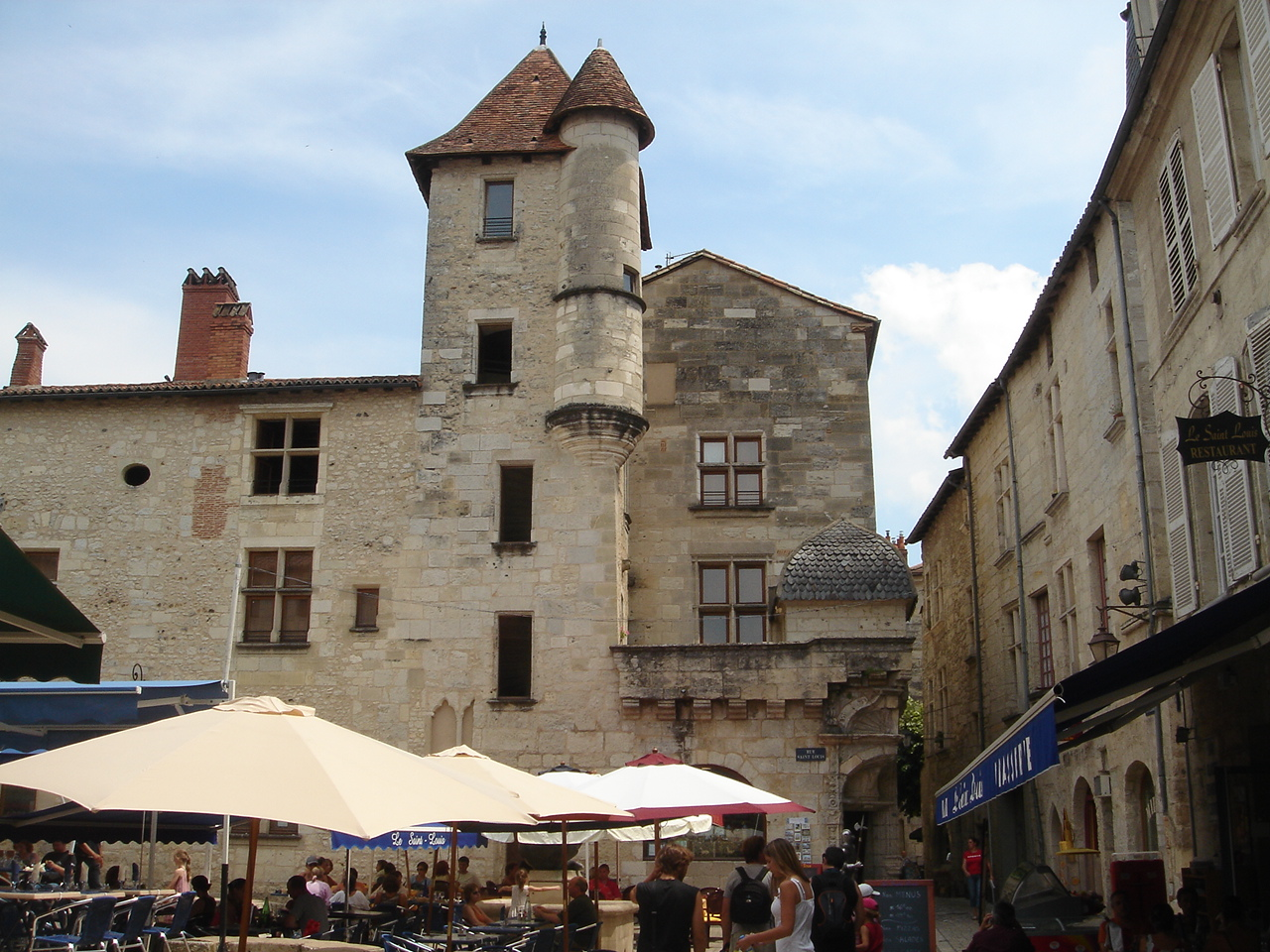 Das Maison de Taillefer, genannt Maison du Pâtissier, im historischen Zentrum von Périgueux.